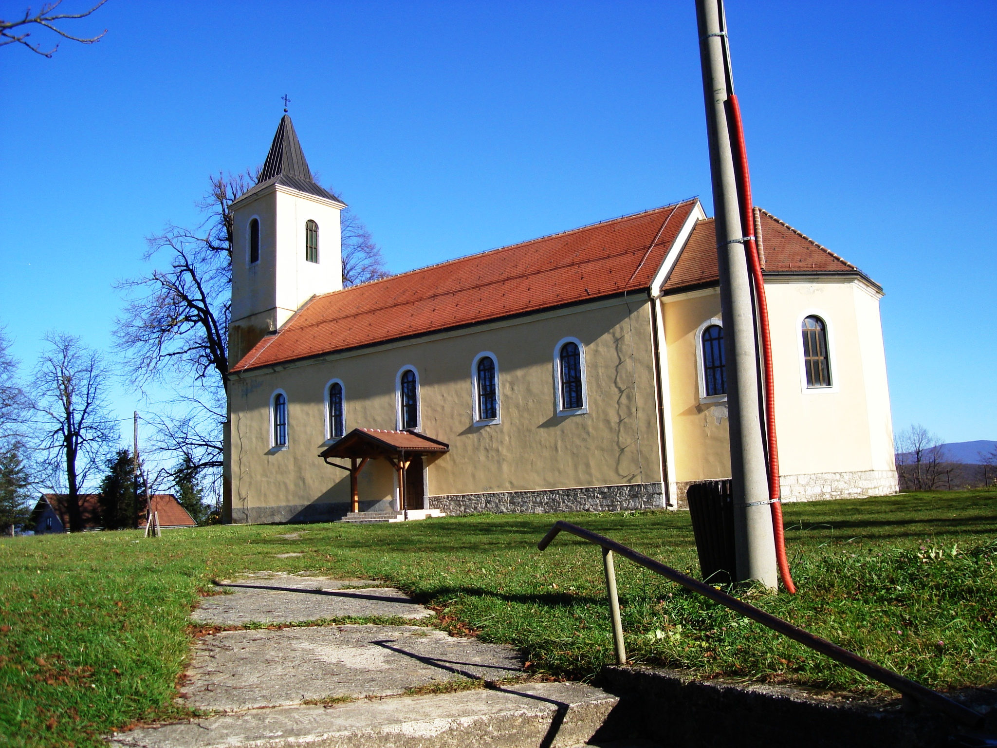 Crkva Zavalje